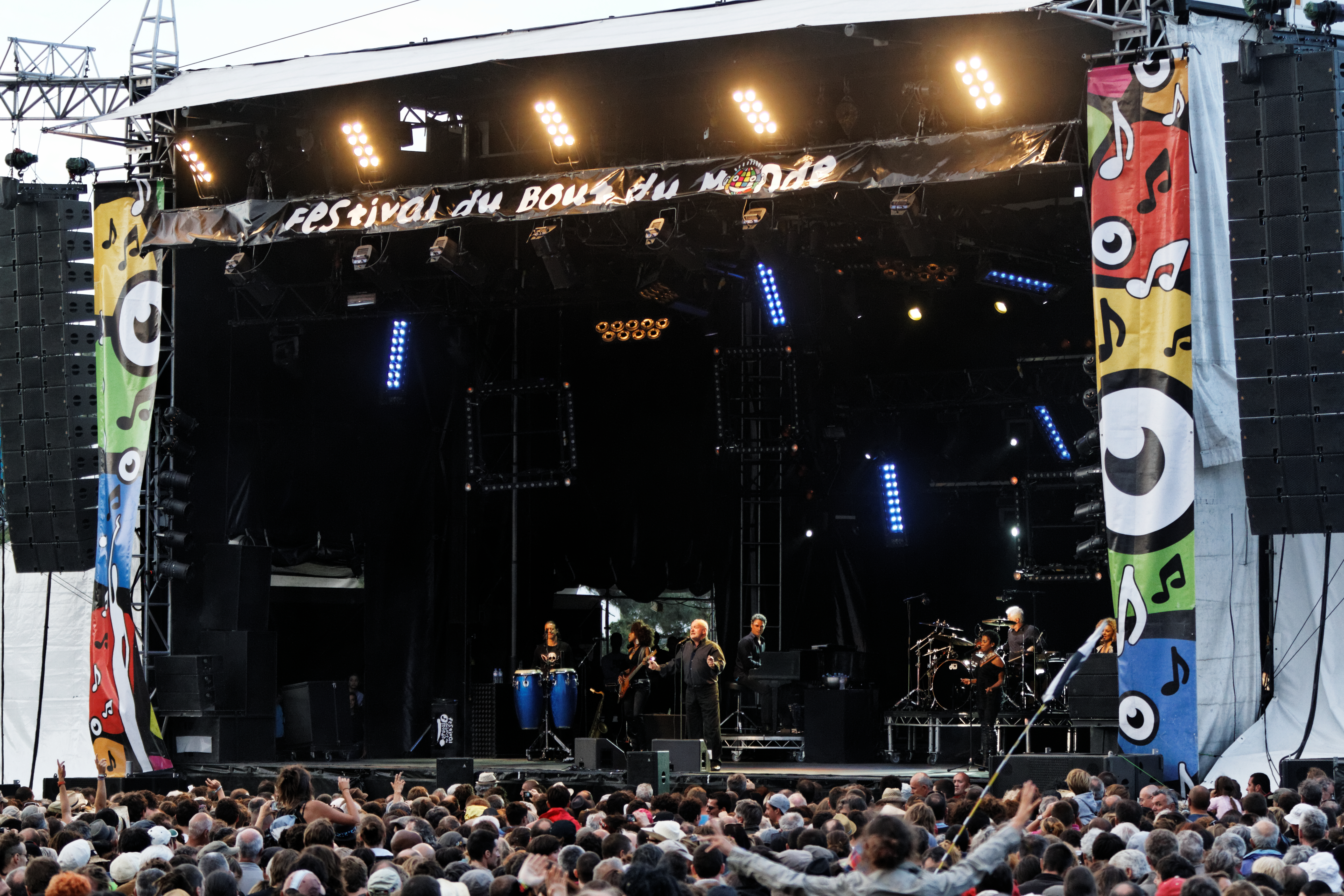 Joe Cocker en concert sur la scène Landaoudec lors du festival du bout du Monde à Crozon dans le Finistère (France).